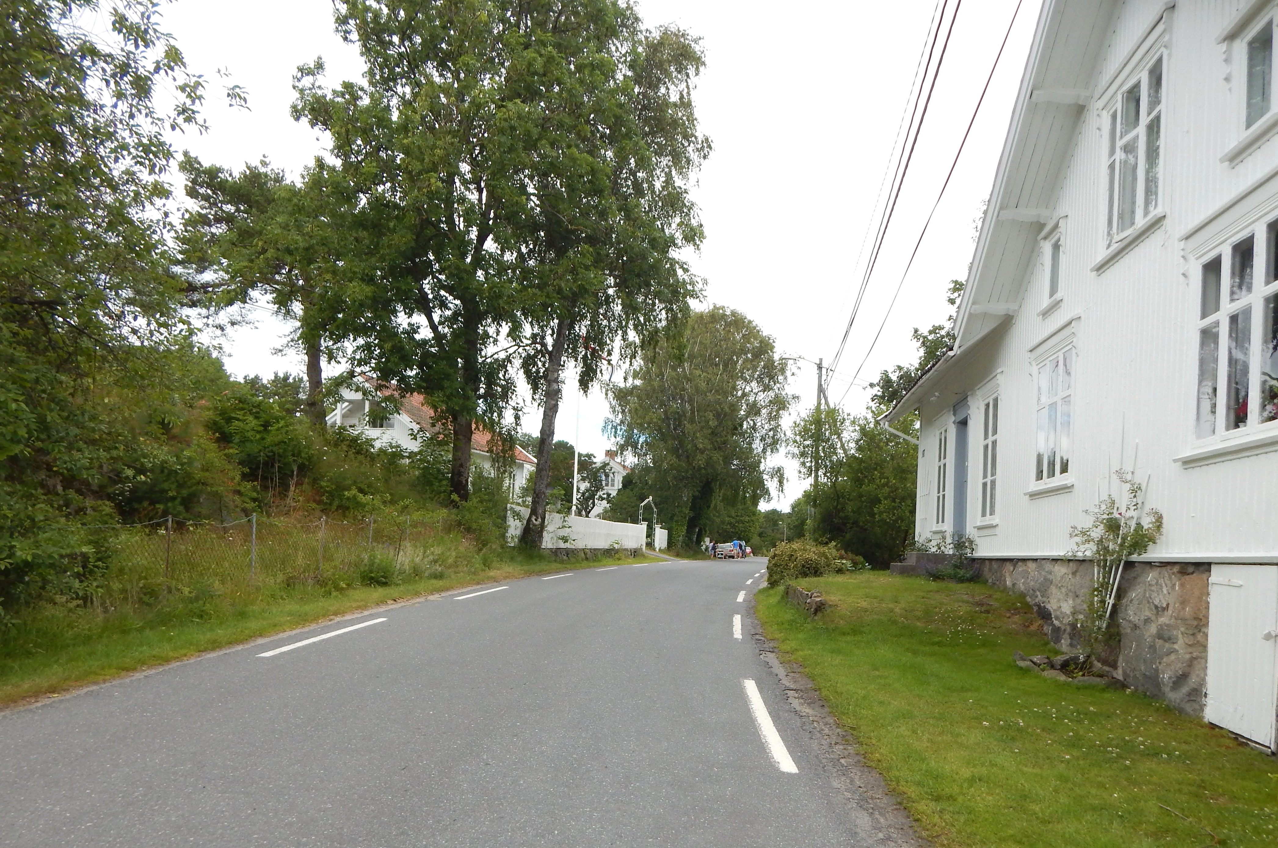 Fylkesvei 38 nær Homborsund i Grimstad kommune